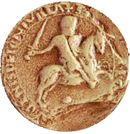 Sceau de Geoffroy V de Joinville vers 1193.